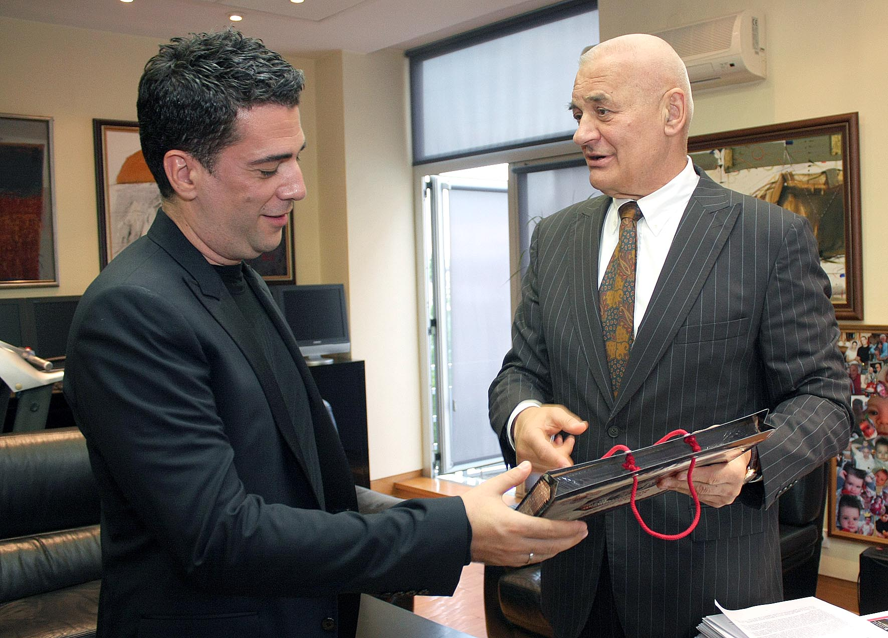 Жељко Јоксимовић и Александар Тијанић 2012